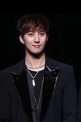 [TV10] 12월 8일 SS301 미니앨범 'ETERNAL 0,1' 쇼케이스 현장